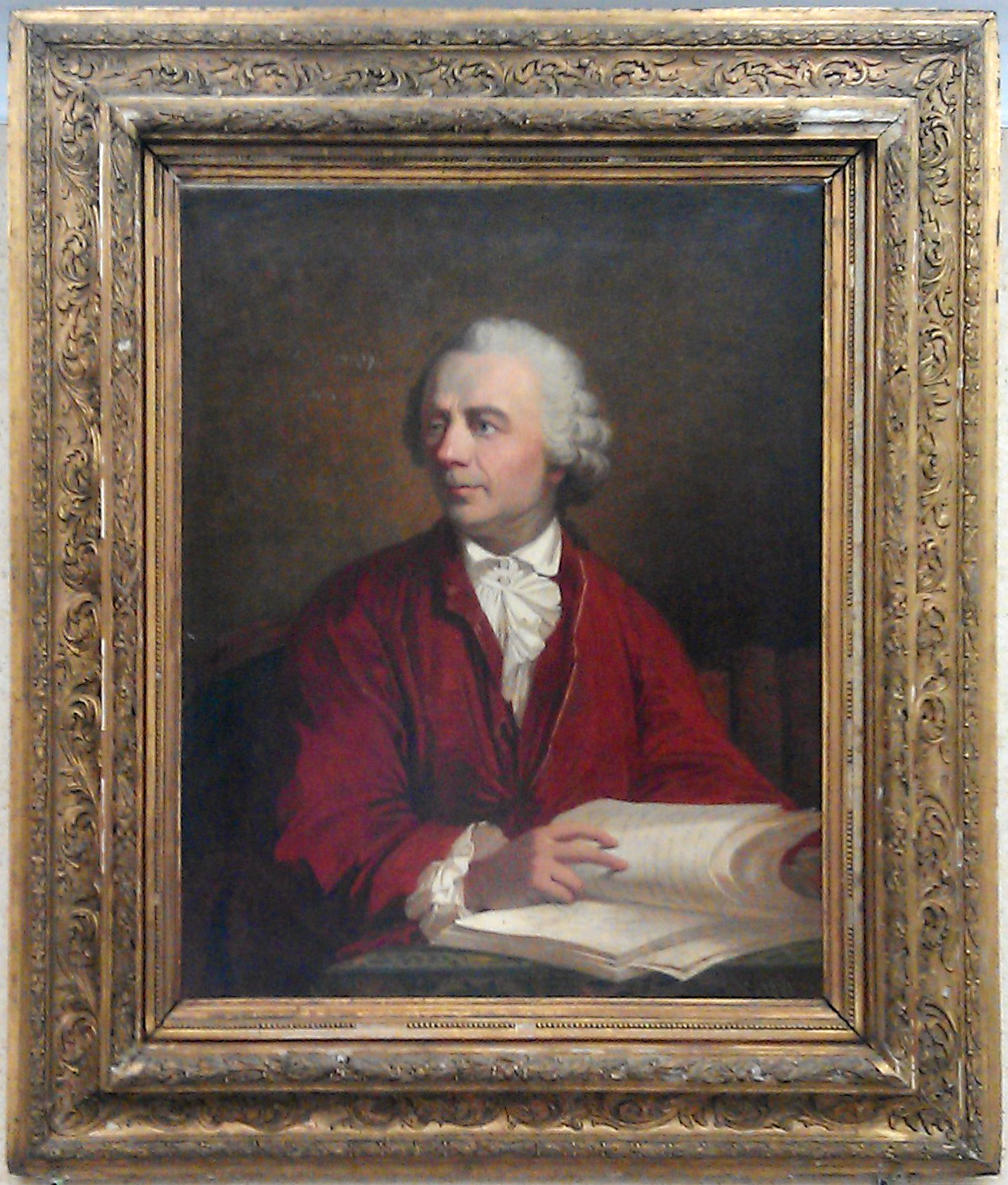 Портрет Эйлера, выполненный для Российской Академии наук в XIX веке (?)